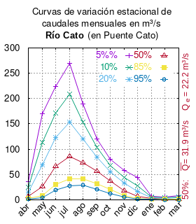 Curvas de variación estacional del río Cato en Puente Cato. # Dirección General de Aguas # Diagnóstico y clasificación de los cursos y cuerpos de agua según objetivos de calidad. Cuenca del río Itata. # Santiago de Chile # Ministerio de Obras Públicas (Chile) # 2004 # url: # urlarchivo: # Tabla 4.5: Río Cato en puente Cato (m3/s) pág.45 mes 5%% 10% 20% 50% 85% 95% abr 35.658 24.532 15.595 6.561 2.258 1.207 may 170.703 113.623 69.286 26.668 7.869 3.606 jun 224.626 171.245 123.277 65.778 30.344 19.262 jul 269.318 209.029 153.792 85.502 41.495 27.145 ago 189.495 153.923 119.656 73.944 40.873 28.854 sep 120.788 103.023 84.503 56.531 31.682 20.407 oct 79.908 68.277 55.985 37.049 20.073 12.561 nov 58.290 44.817 32.598 17.739 8.384 5.399 dic 43.964 28.111 16.507 6.297 2.364 1.583 ene 6.915 5.523 4.206 2.499 1.316 0.903 feb 5.077 4.052 3.083 1.829 0.961 0.659 mar 8.334 6.118 4.208 2.057 0.852 0.508 This plot was created with Gnuplot.